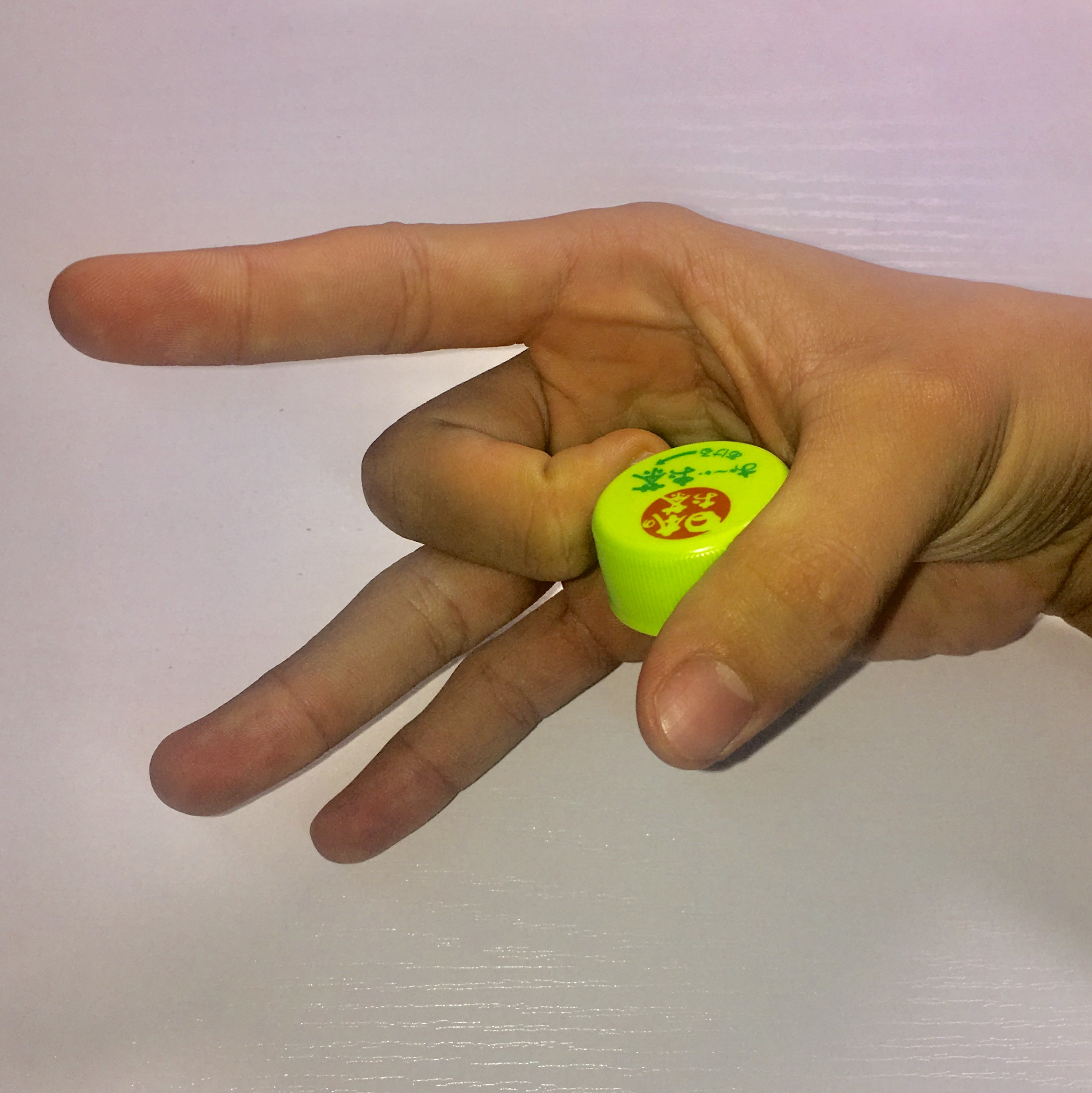 キャップの持ち方